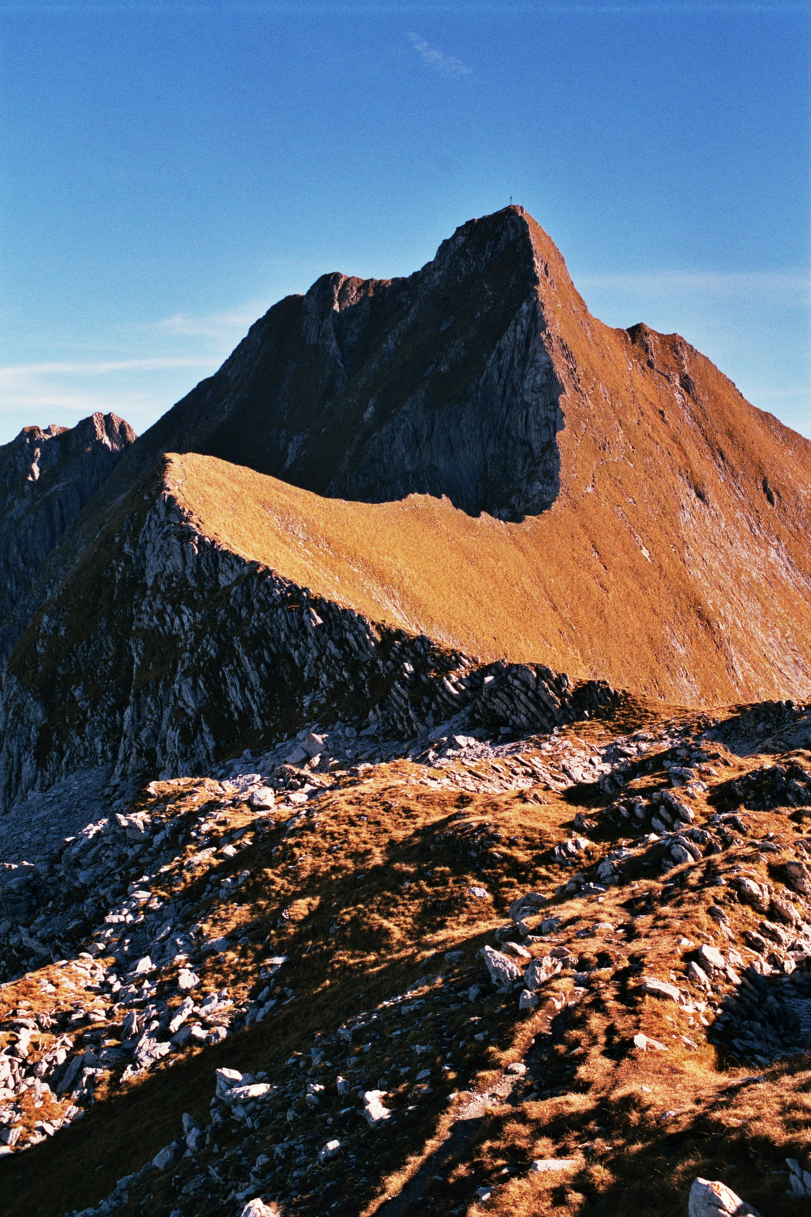 Le Vanil Noir, montagne de la Gruyère, alt. 2389m, commune de Grandvillard, sur la frontière entre le canton de Fribourg et le canton de Vaud. Montagne des Préalpes en Suisse. Située dans une réserve de chasse.